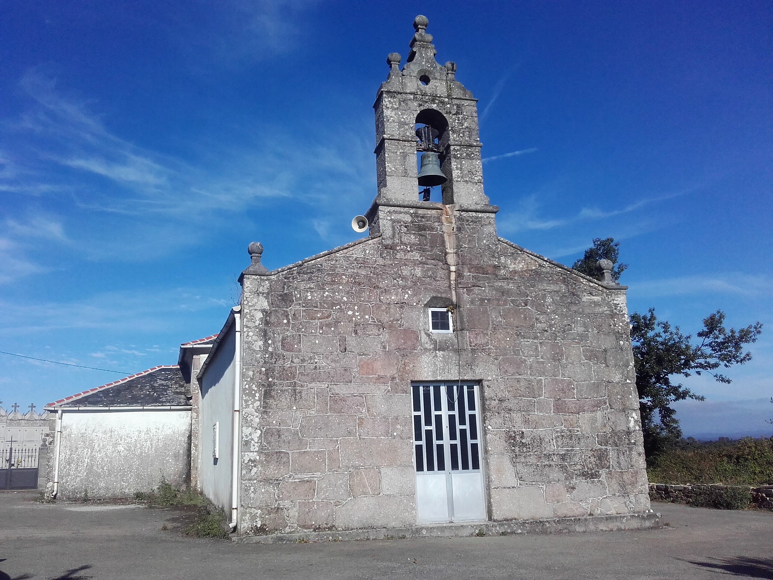 Igrexa de San Xurxo de Rioaveso, Vilalba.